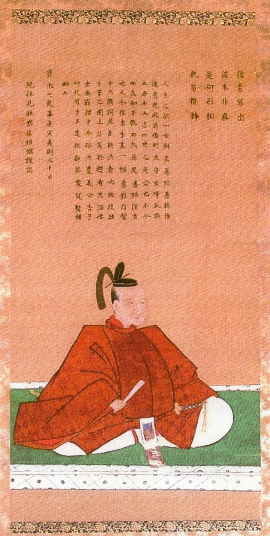 伊勢菰野藩3代藩主・土方雄豊の肖像画。